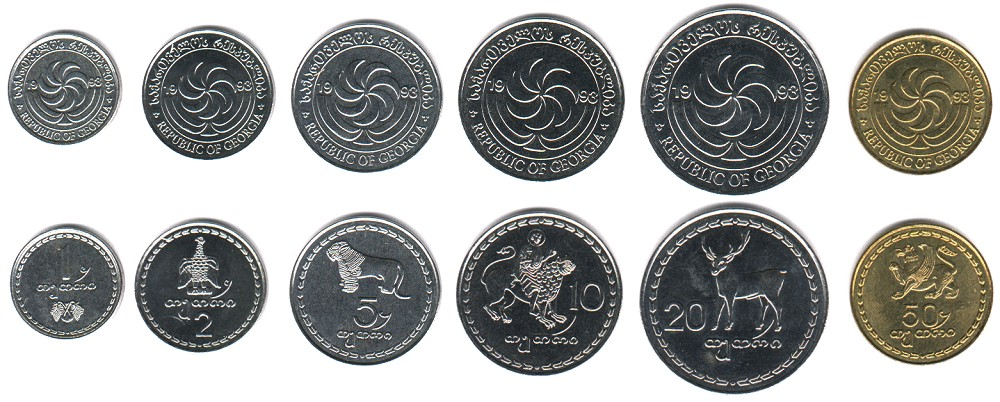 Lari georgiano